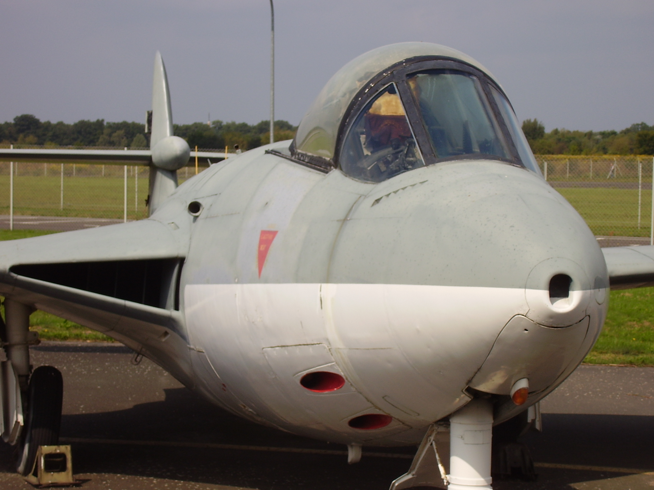 Luftwaffenmuseum der Bundeswehr; Airforce Museum of the Bundeswehr; Berlin-Gatow, Mk.4